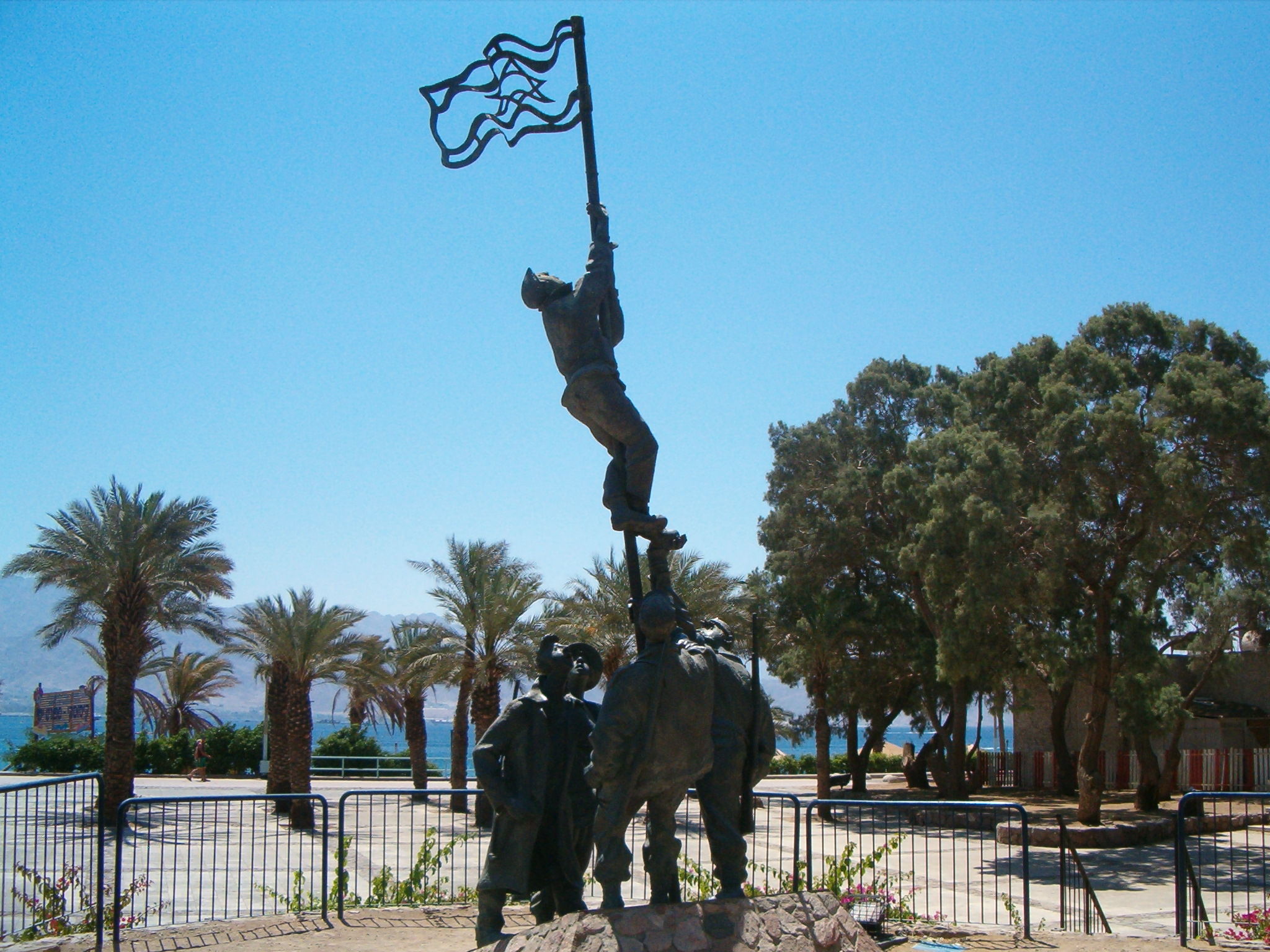 פסל מתכת באילת המתאר את מעמד הנפת דגל הדיו באום רשרש במלחמת העצמאות. הפסל נמצא בגן ליד קניון החוף בחוף הצפוני של אילת. צילם י.ש. 10:20, 14 מאי 2006 (IDT)